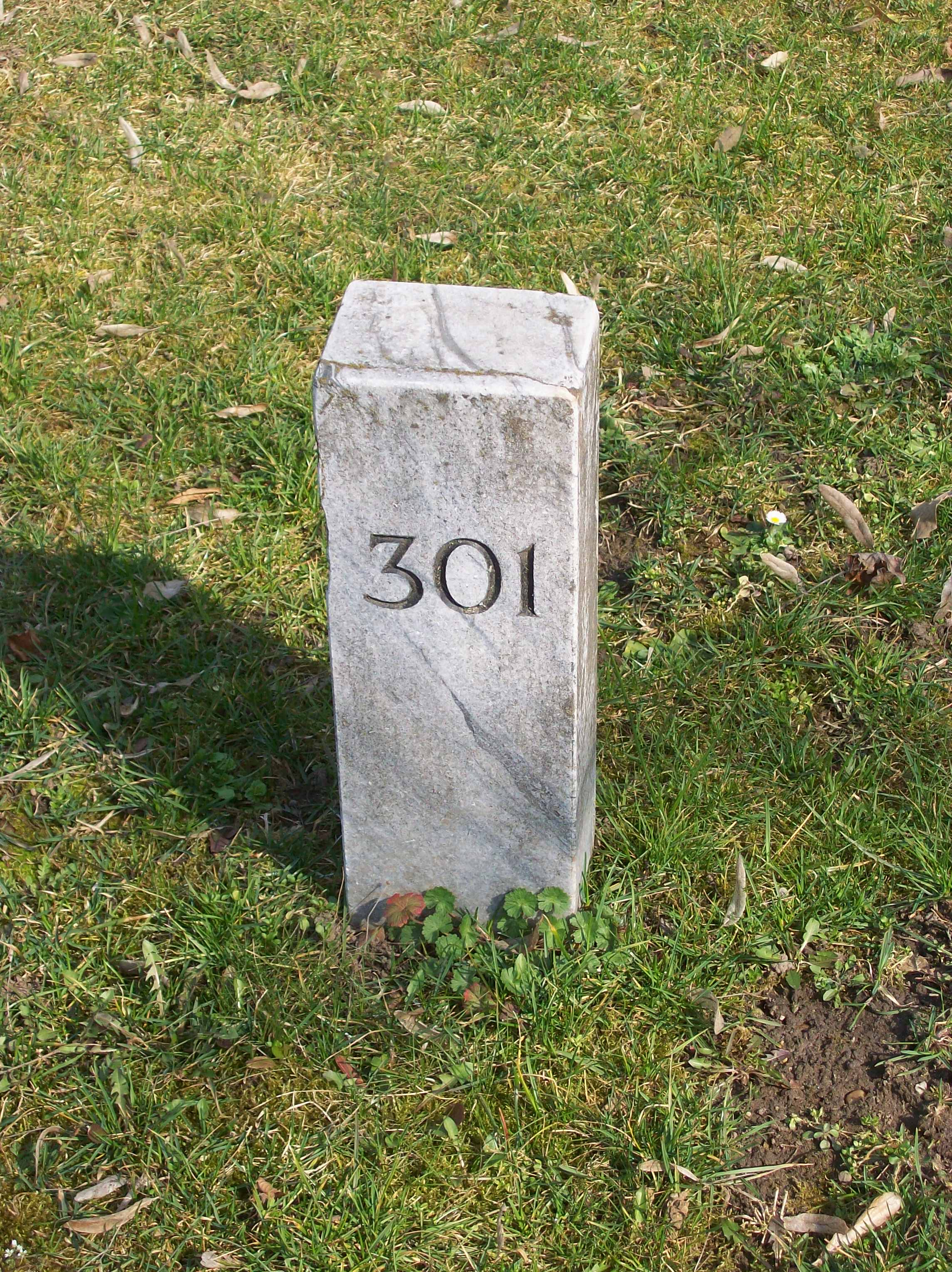 301-es parcella, kő (Budapest, Kőbánya, Újköztemető)